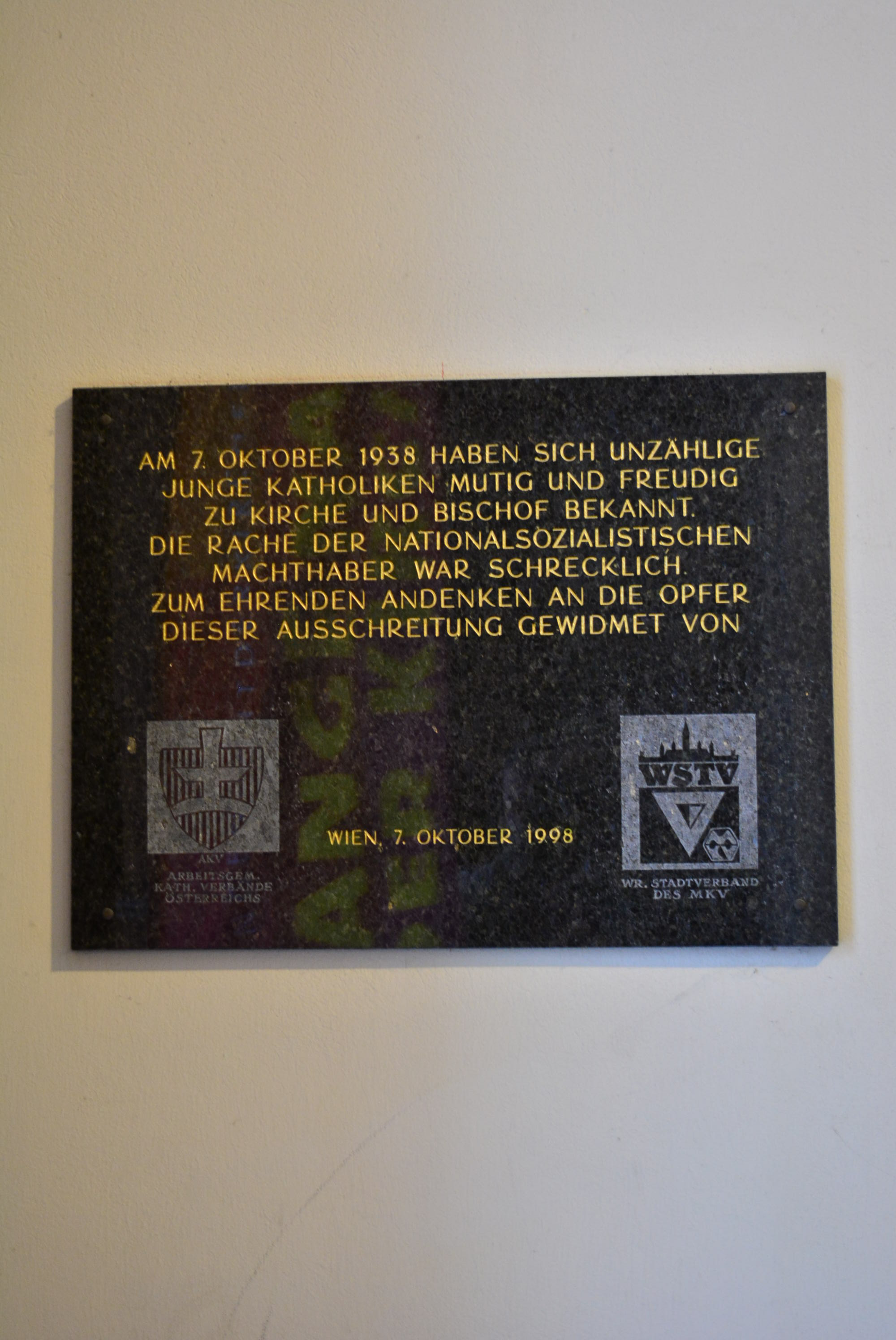 Gedenktafel für die Rosenkranz-Demonstration (Wien, Rotenturmstraße 2)